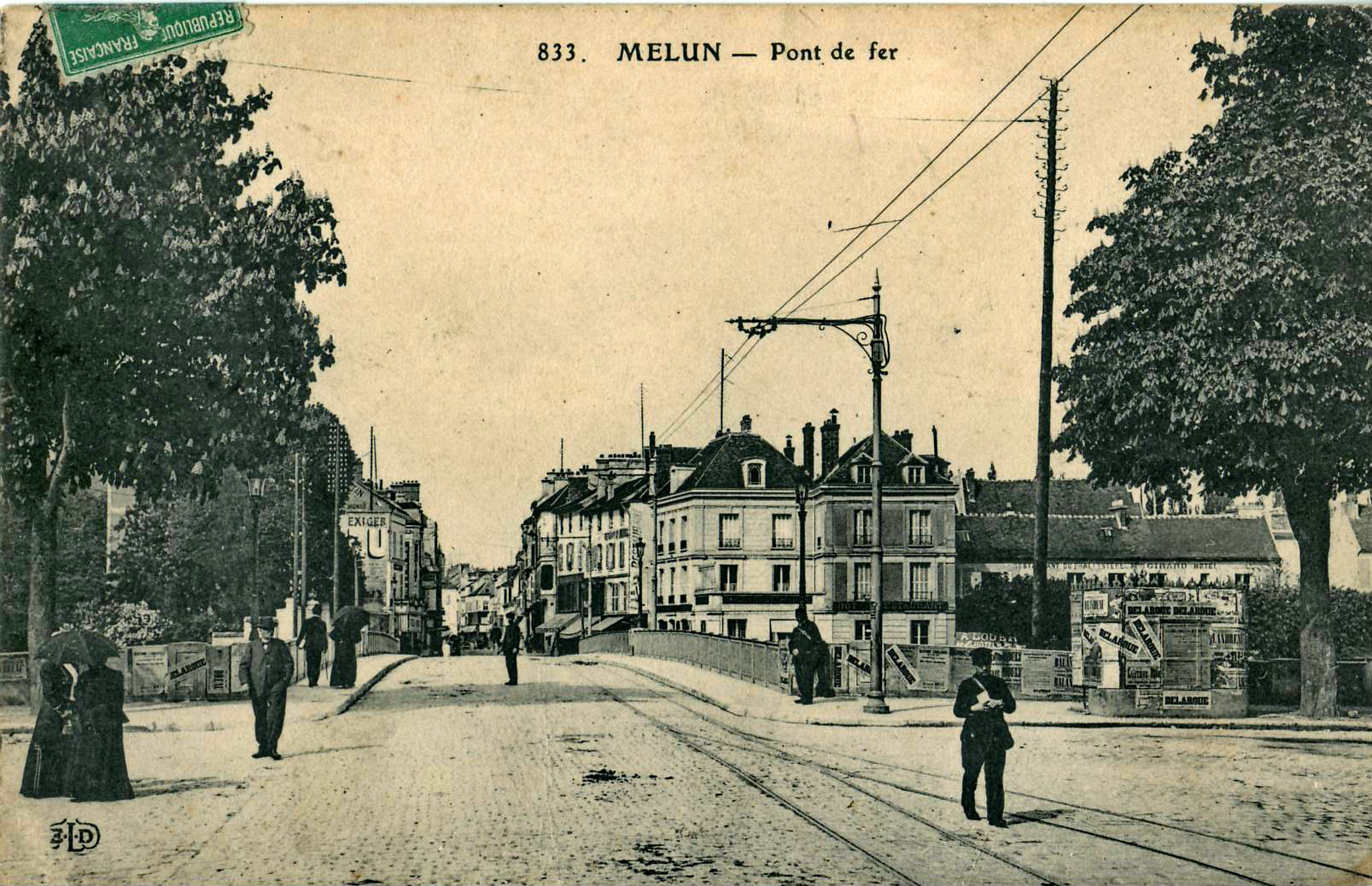 Carte postale ancienne éditée par ELD, n°833 : MELUN - Le Pont-de-Fer